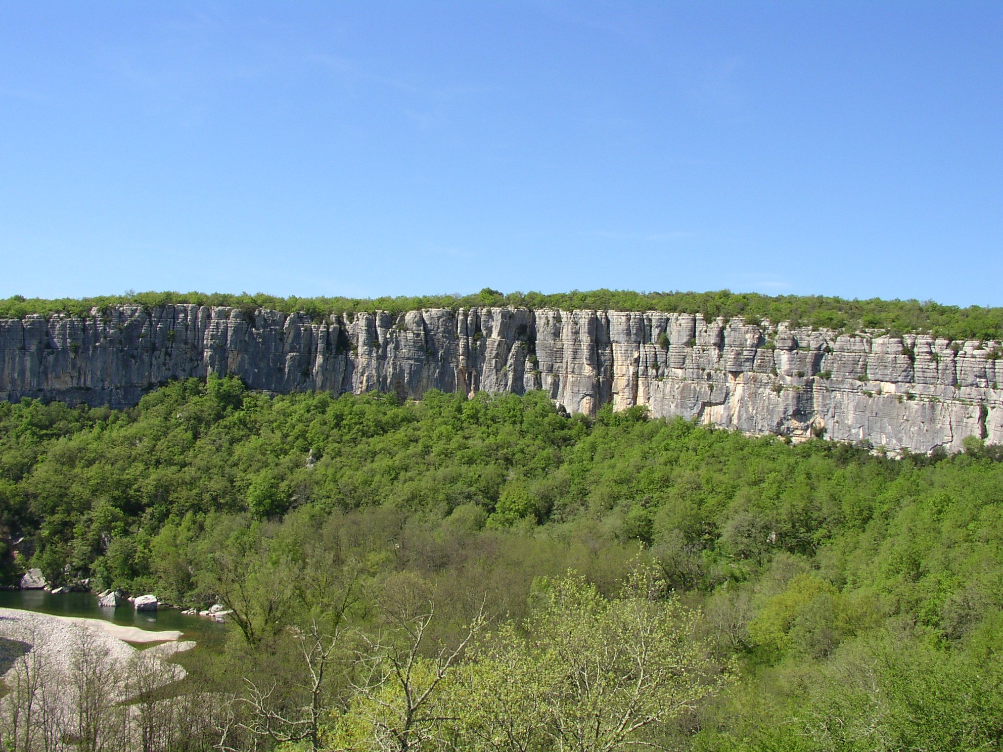 Les falaises du cirque de Giens